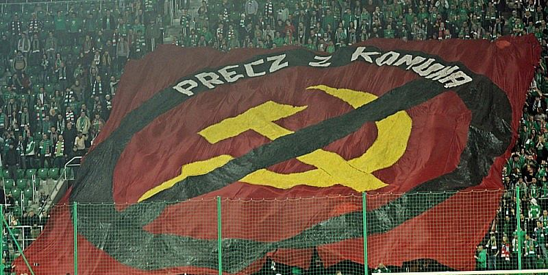 Precz z komuną - Stadion Miejski we Wrocławiu - Ultras Śląsk Wrocław